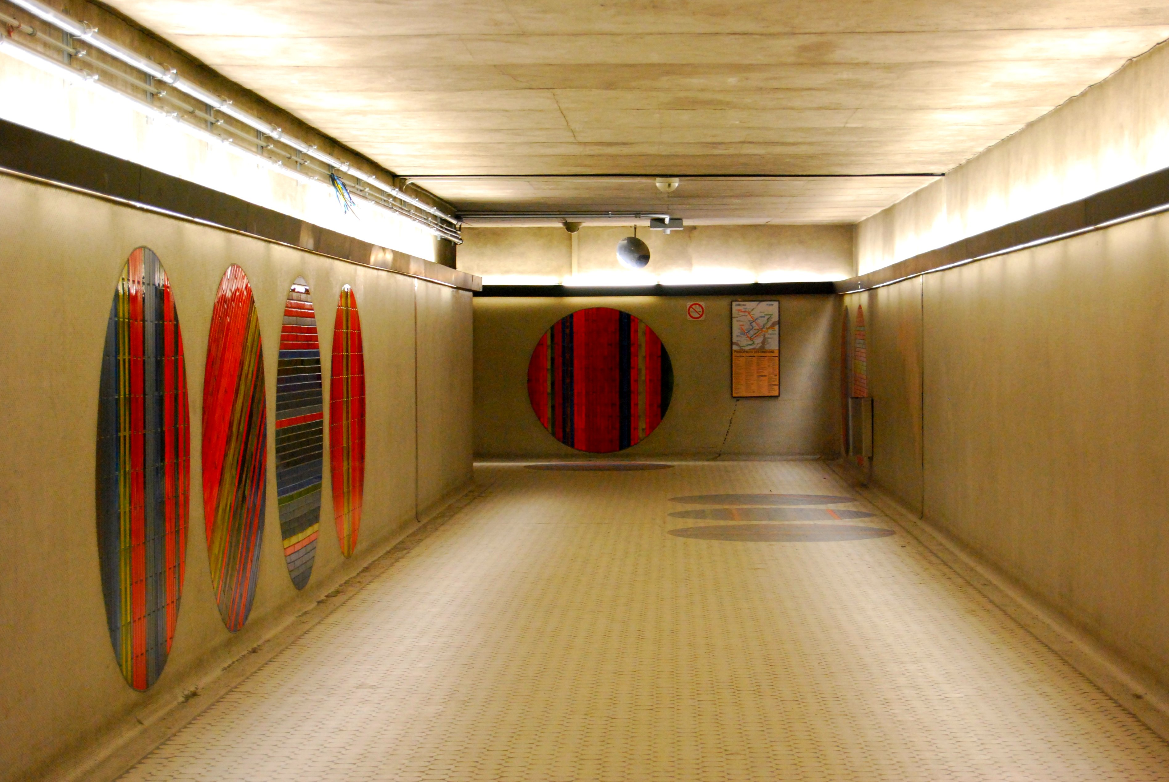 Metro Circles